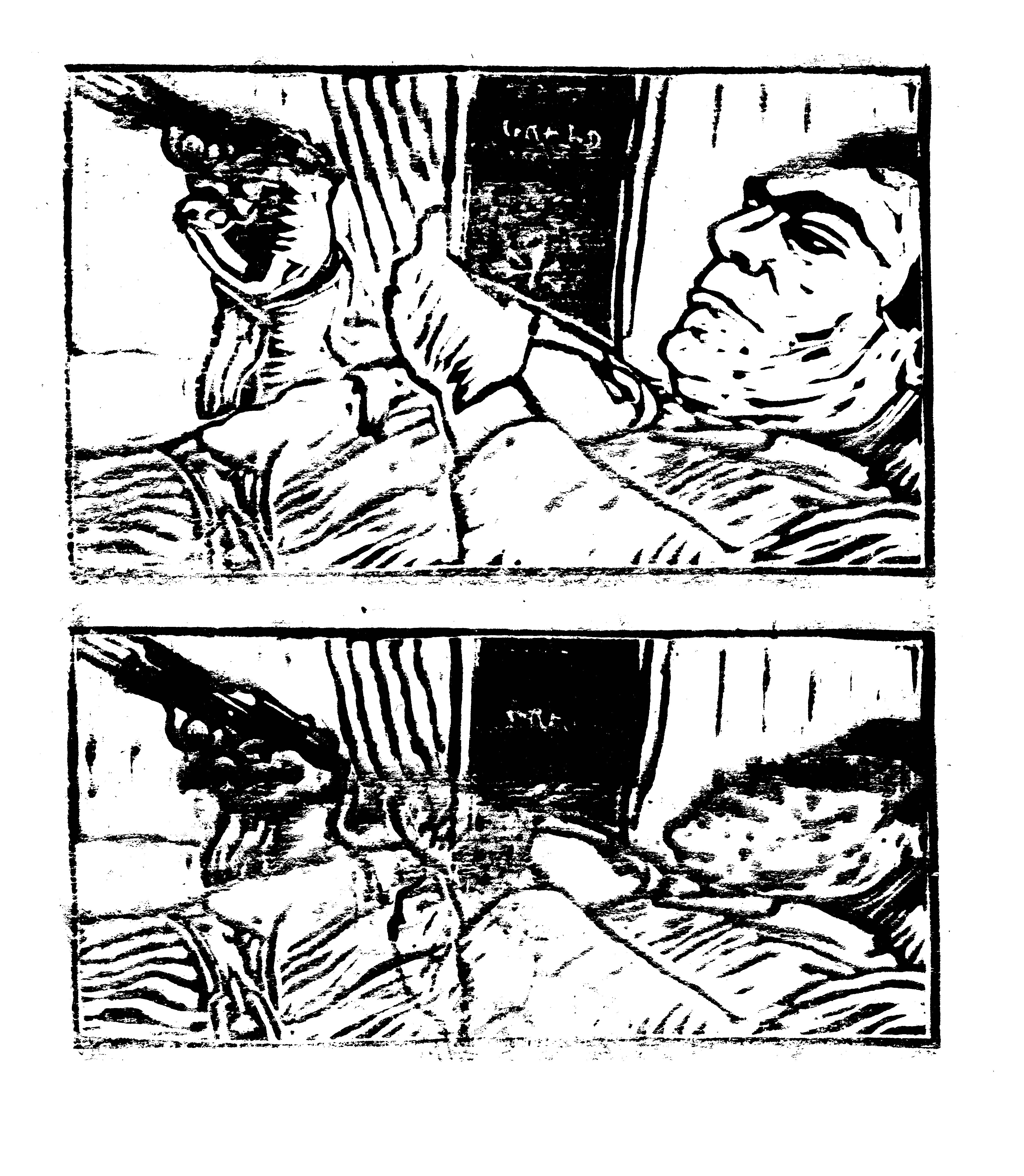 Linoryt, knihtisk (1994)